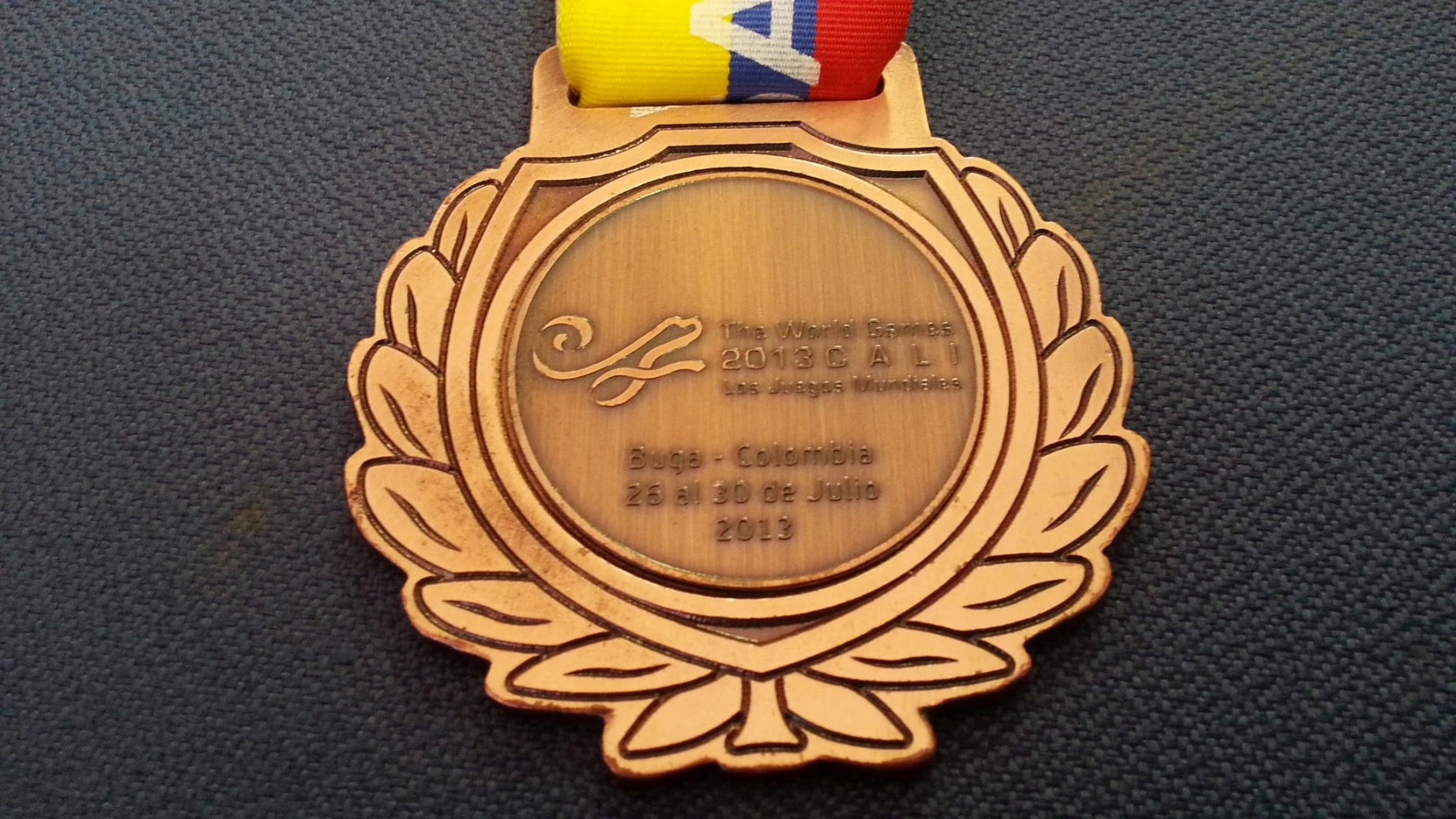 Medalha de bronze do Brasil nos Jogos Mundiais 2013 na modalidade Futebol de Salão AMF